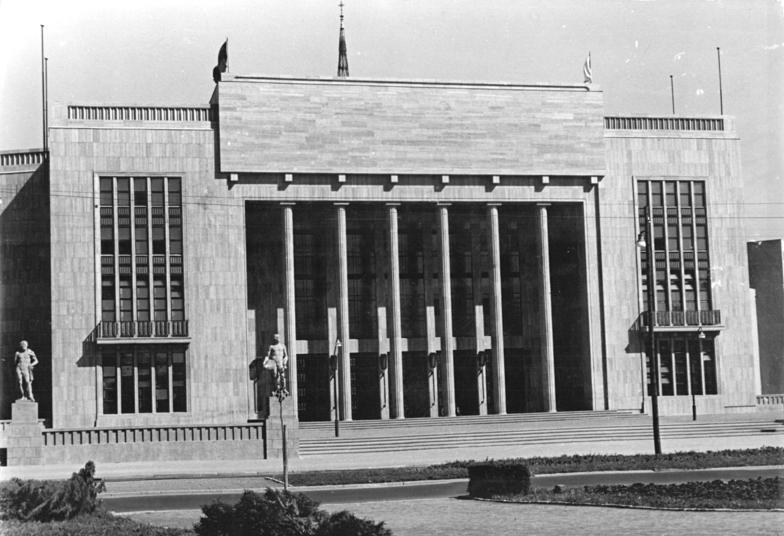 Berlin, Karl-Marx-Allee, "Deutsche Sporthalle" Zentralbild Schmidtke 29.8.51 Die Sporthalle in der Karl-Marx-Allee in Berlin.